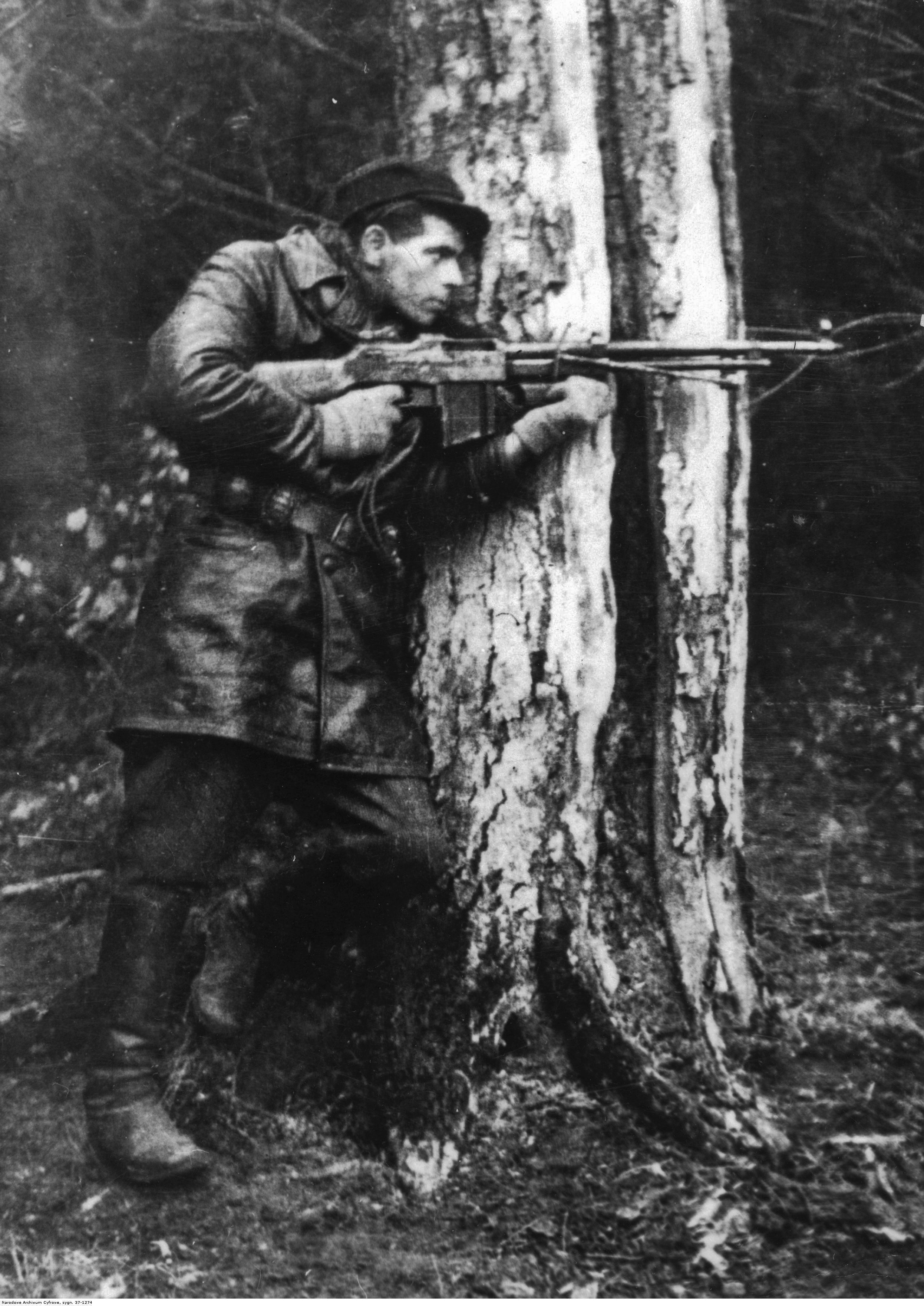 Zdzisław de Ville ps. "Zdzich", żołnierz oddziału "Jędrusiów", Okręg Radomsko-Kielecki Armii Krajowej z ręcznym karabinem maszynowym. (Fotografia pochodząca z archiwum fotograficznego Stefana Bałuka.)